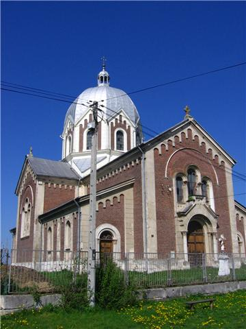 Nowy Lubliniec - dawna cerkiew Przemienienia Pańskiego, obecnie kościół katolicki.